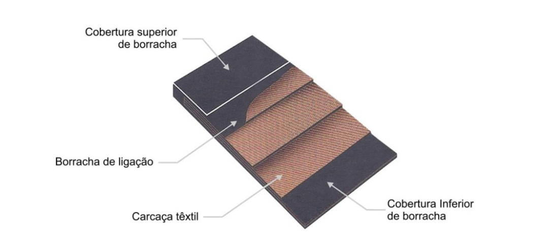 Componentes de uma correia